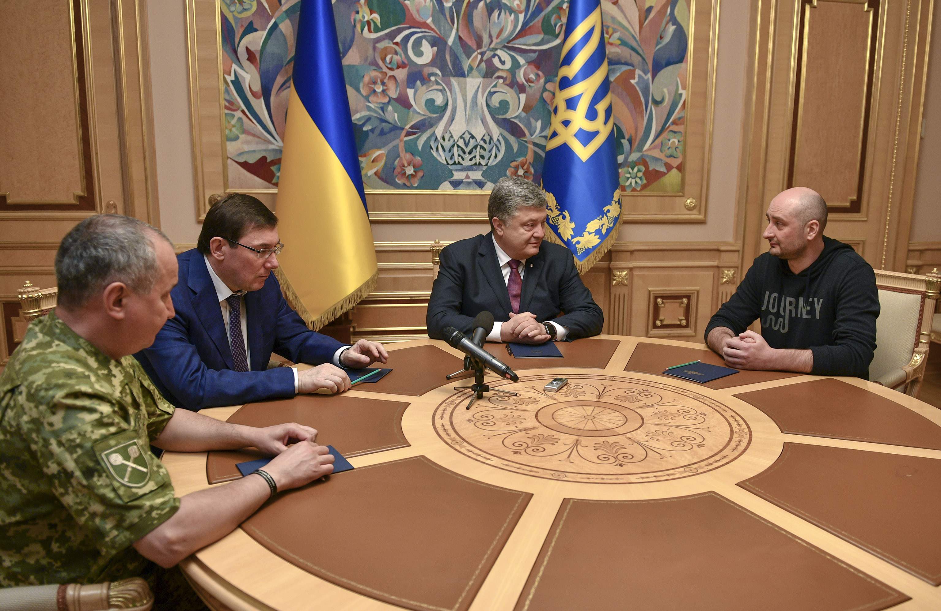 Президент України Петро Порошенко зустрівся з журналістом Аркадієм Бабченком